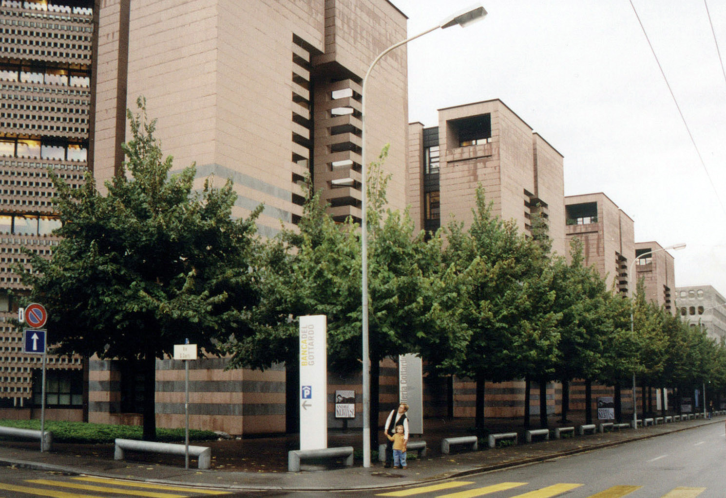 Ticino Lugano Banca del Gottardo Botta